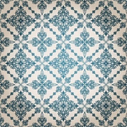 Damask